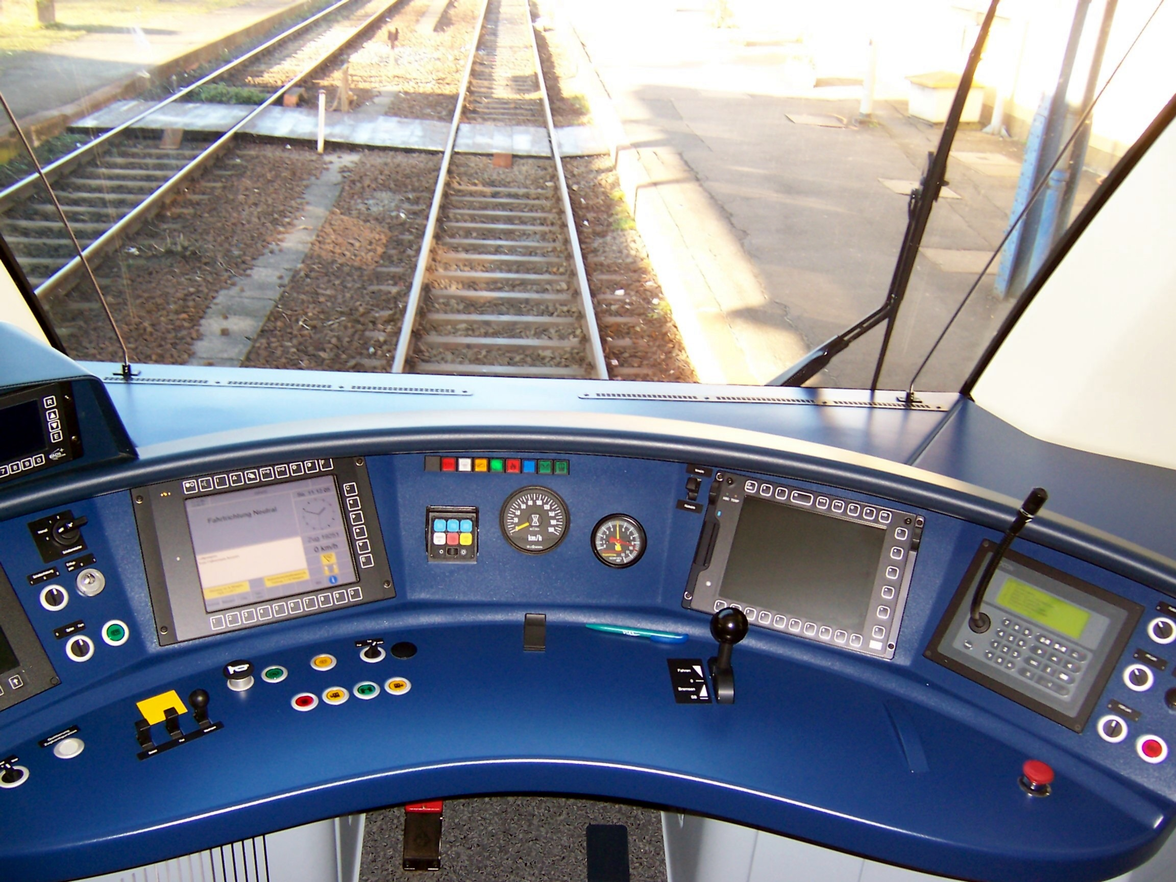 Bildbeschreibung/Description: Fuehrerstand ITINO D2 der Odenwaldbahn/Drivers Desk on a Diesel Railcar ITINO in Germany Quelle/Source: selbst fotografiert/self taken Photo Fotograf/Photographer: Markus Flath Datum/Date: 11.12.2005 Deutschland/Germany